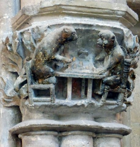 Zwei schachspielende Affen in einem Kapitell an der Nordseite des Ostchores des Naumburger Doms.